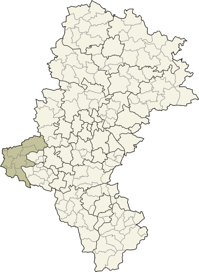 Powiat raciborski w województwie śląskim